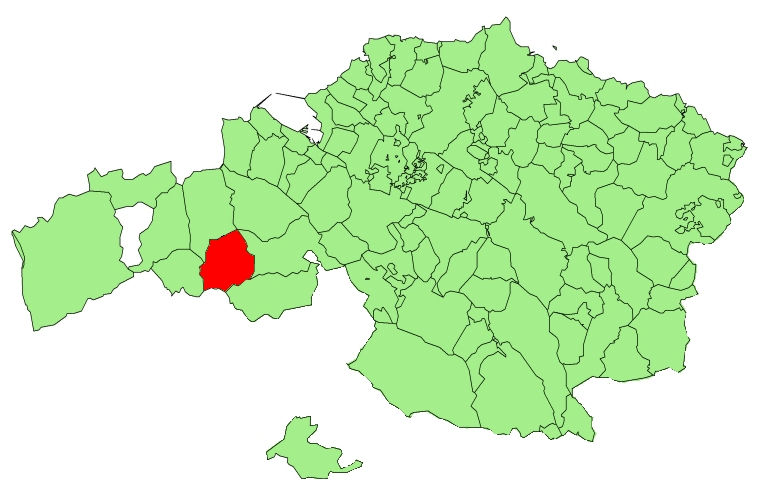 Municipio de Zalla